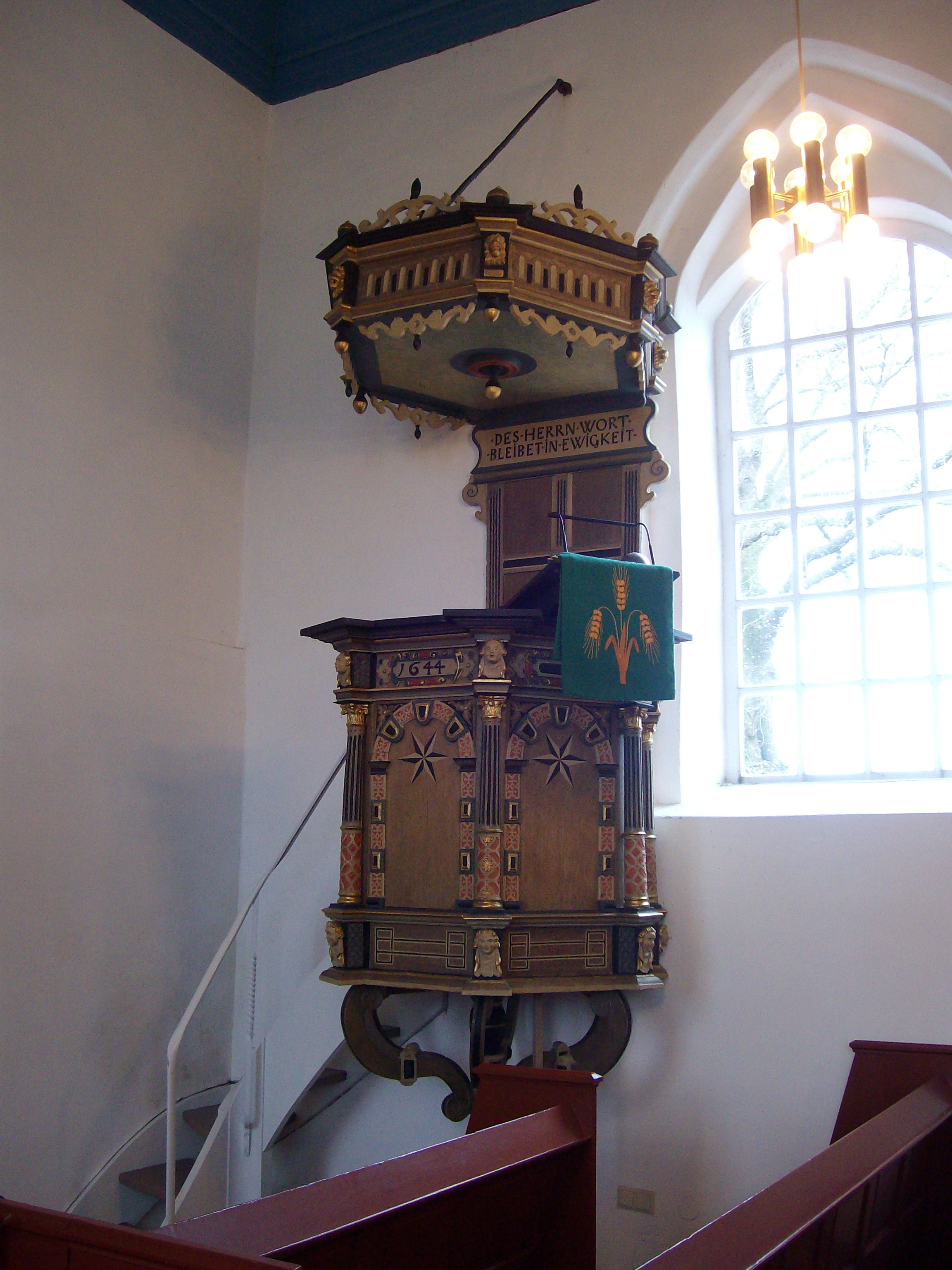 Holtgaste, Kanzel